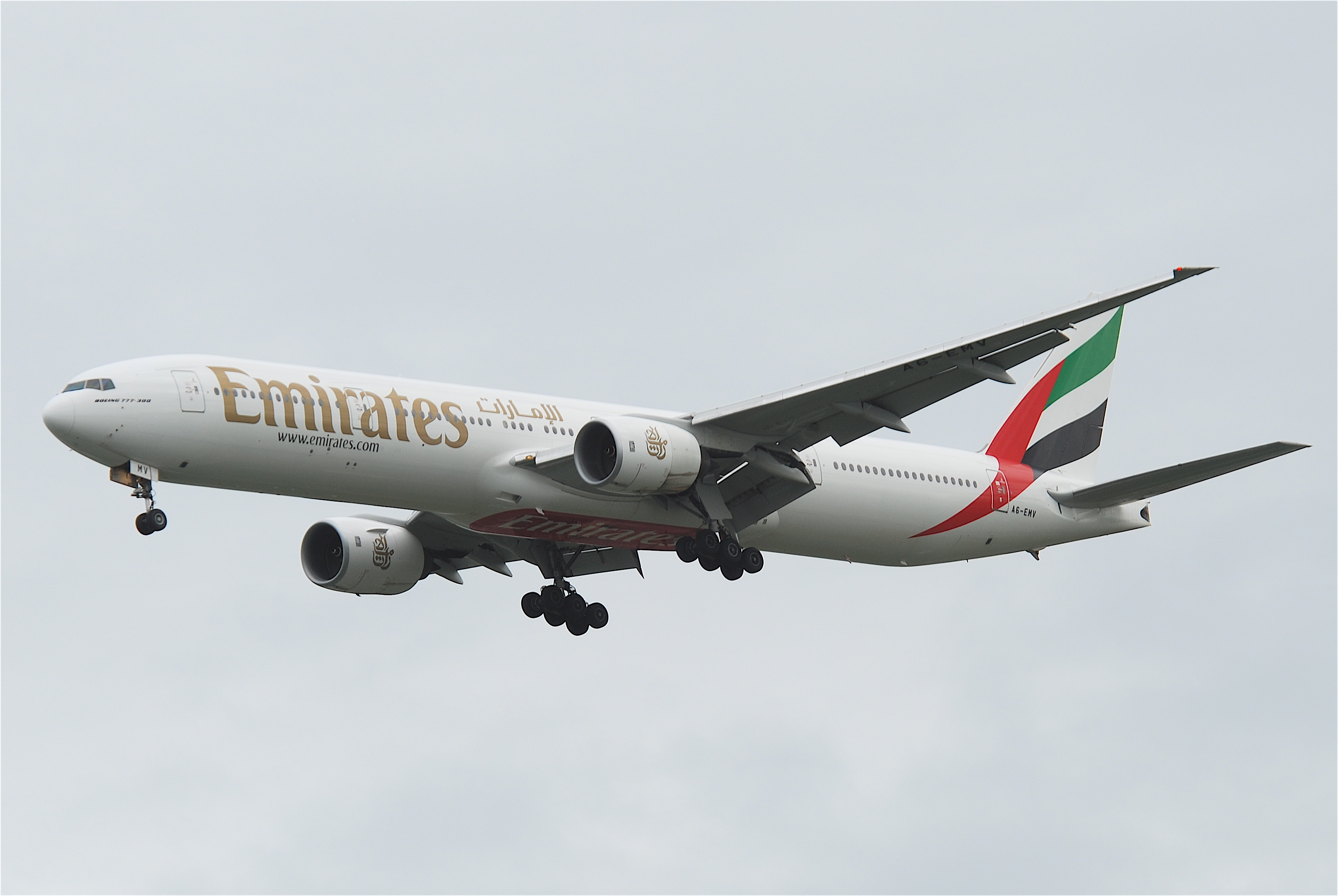 Emirates Boeing 777-300; A6-EMV@BKK;30.07.2011/613bz